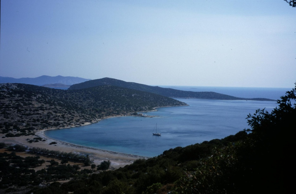 Beschreibung: Blick über die Ankerbucht von Alimia, fotografiert am 25.8.2000 Quelle: selbst fotografiert Fotograf: Hans-Heinrich Hoffmann 17:48, 25. Jun 2005 HHHoffmann 1024 x 670 (156.544 Byte) (Blick über die Ankerbucht von Alimia, selbst fotografiert, gemeinfrei)